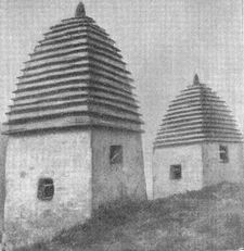 Надземные склепы у с. Фалхан 1929 - 1930 гг